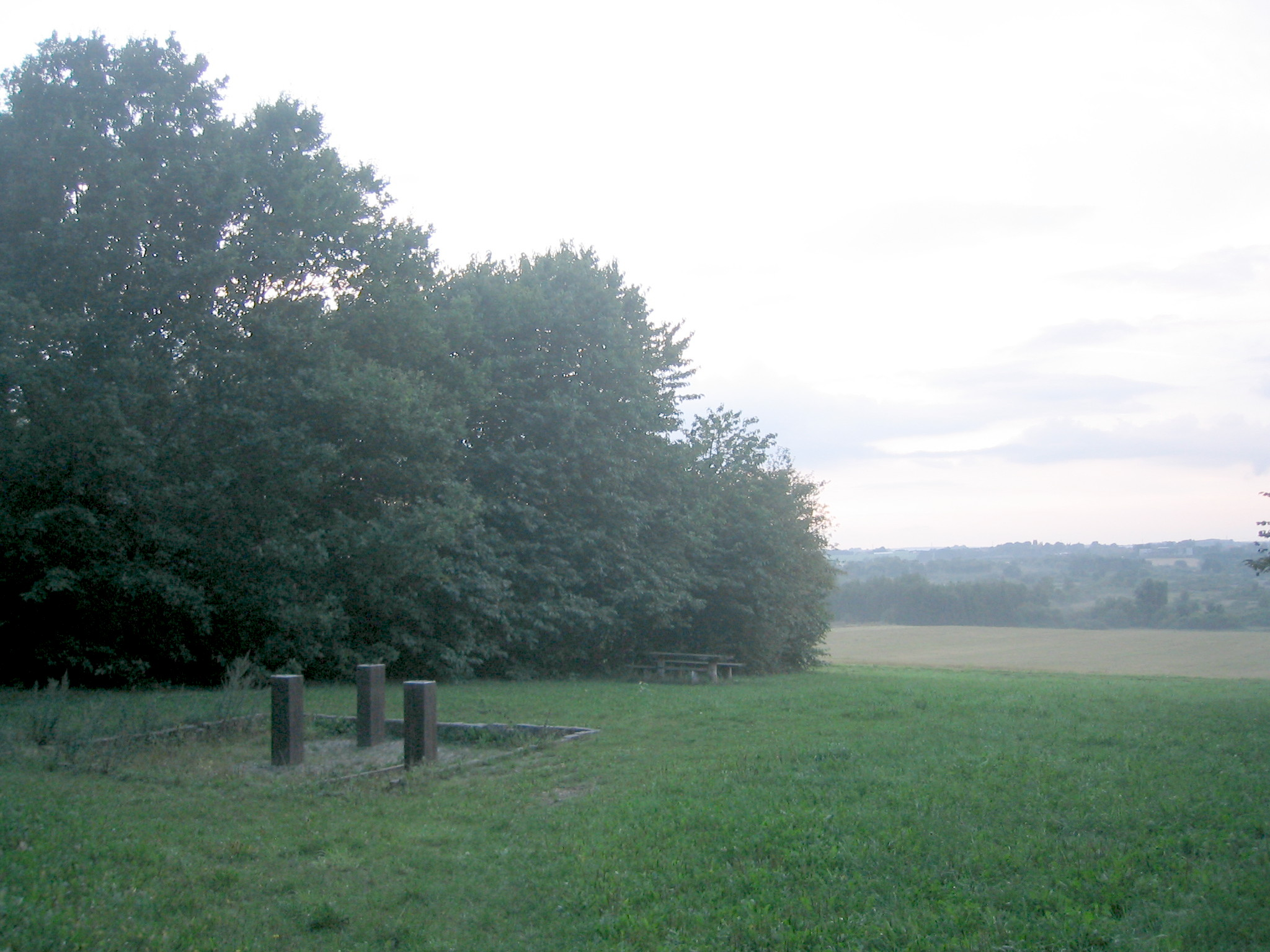 Ole Rømer's Observatorium Tusculanum from 1704 in Vridsløsemagle, Denmark